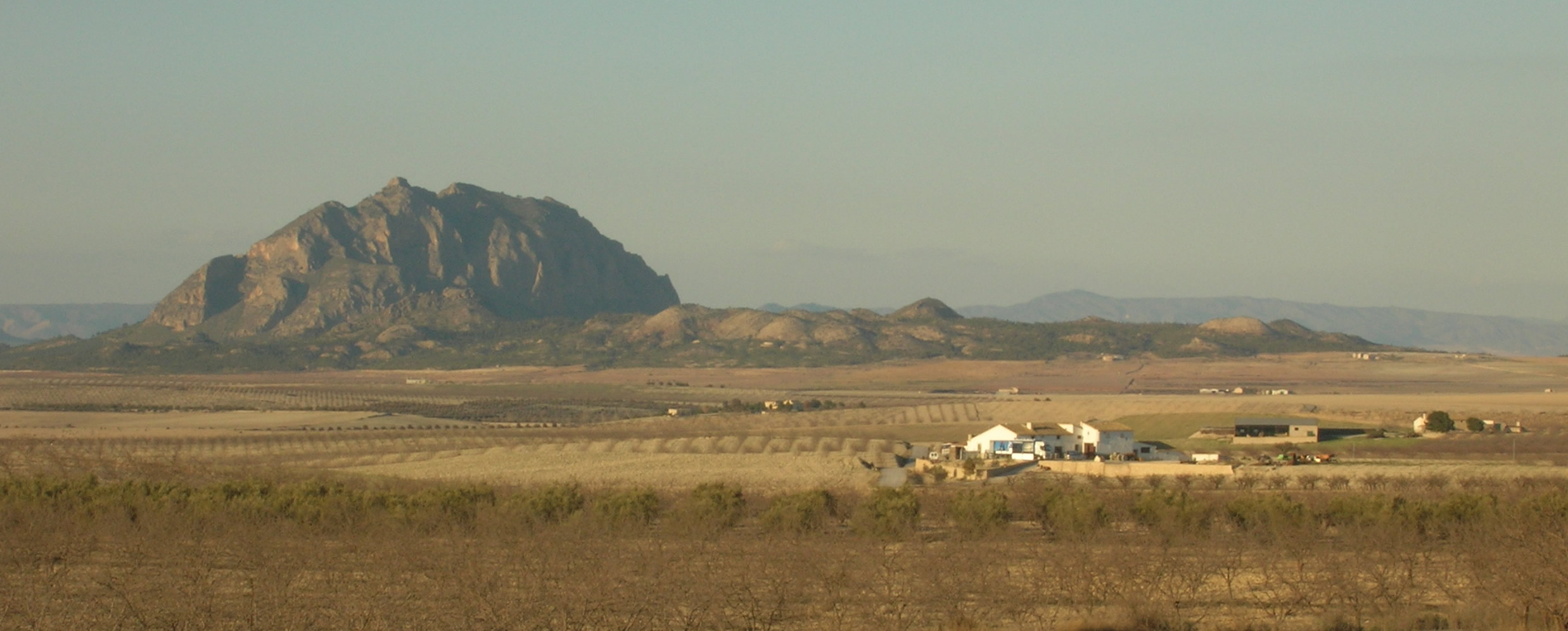 Monte del Almorchón, en Cieza, Murcia, España, desde la carretera de Calasparra a Mula, poco antes de enlazar con la de Mula a Cieza. Febrero de 2006.